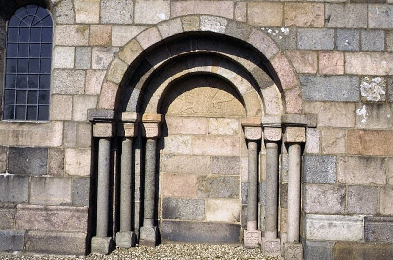 Rybjerg Kirke, (Skive Kommune), Sydportal